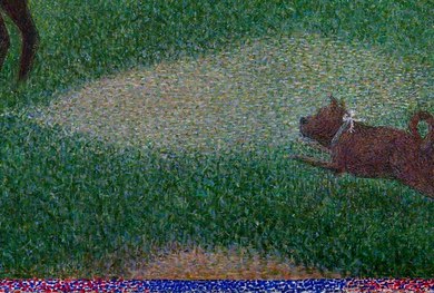 Ausschnitte aus: Georges Seurat (1859-1891), Ein Sonntagnachmittag auf der Insel La Grande Jatte (Un dimanche après-midi à l'Île de la Grande Jatte), 1884-1886, Öl auf Leinwand, 207,6x308 cm, Art Institute of Chicago.